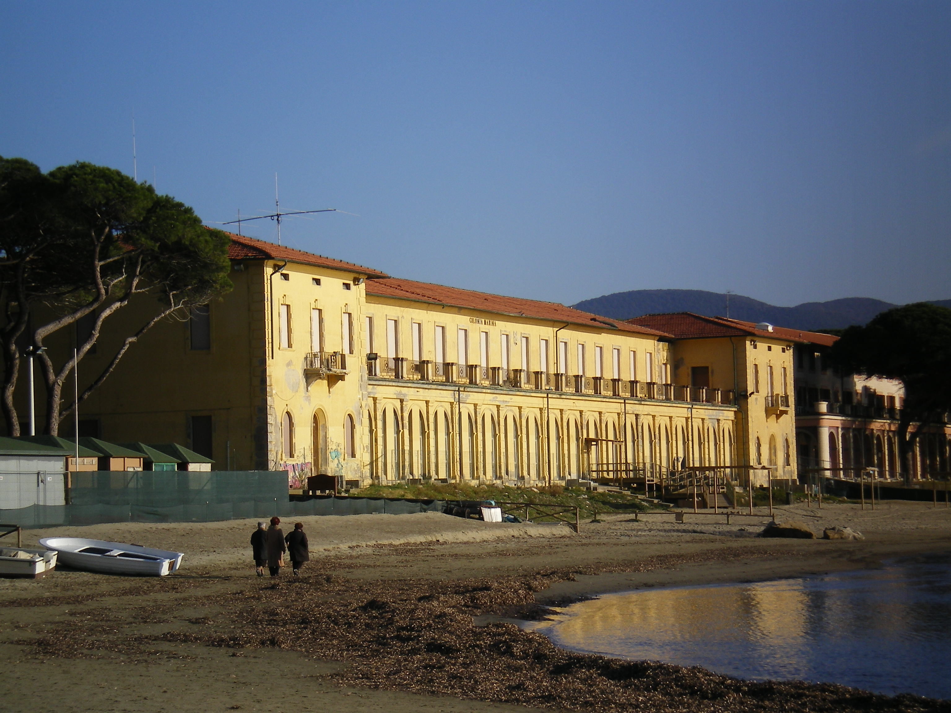 Colonia Marina presso la Spiaggia di Levante, Follonica